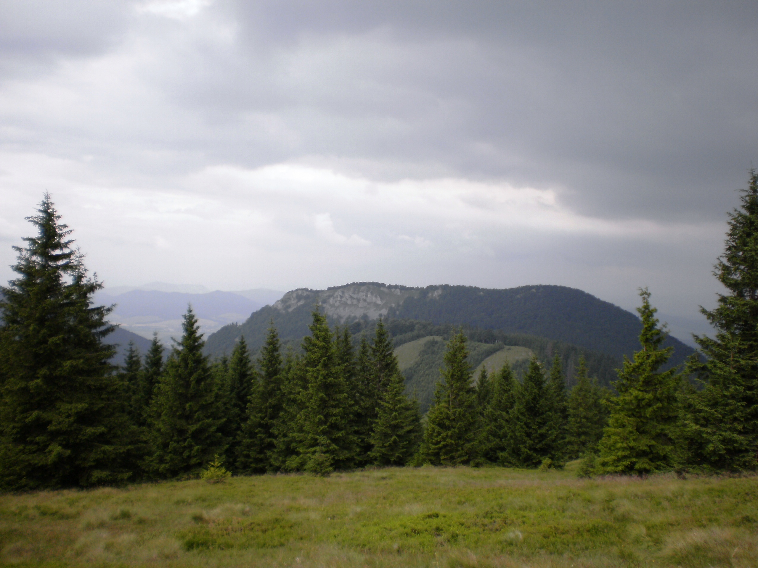 Kozol